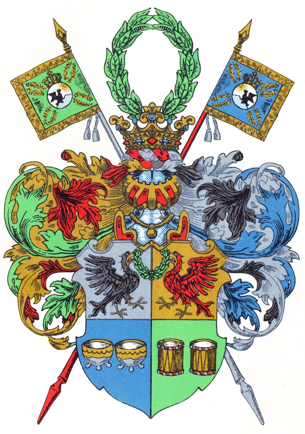 Wappen der 1731 zu Berlin geadelten von Kortzfleisch